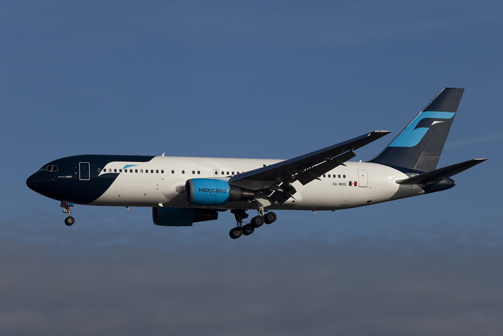 XA-MXO B767 Mexicana